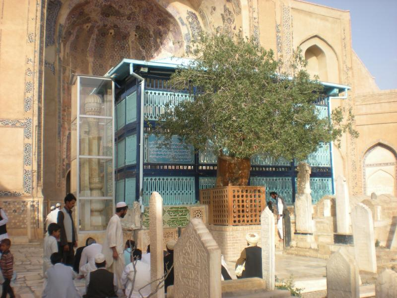 آرمگاه خواجه عبدالله انصاری در شمال شهر هراتوحید پیمان ۲۵ اکتبر ۲۰۰۸، ساعت ۰۵:۳۵ (UTC)